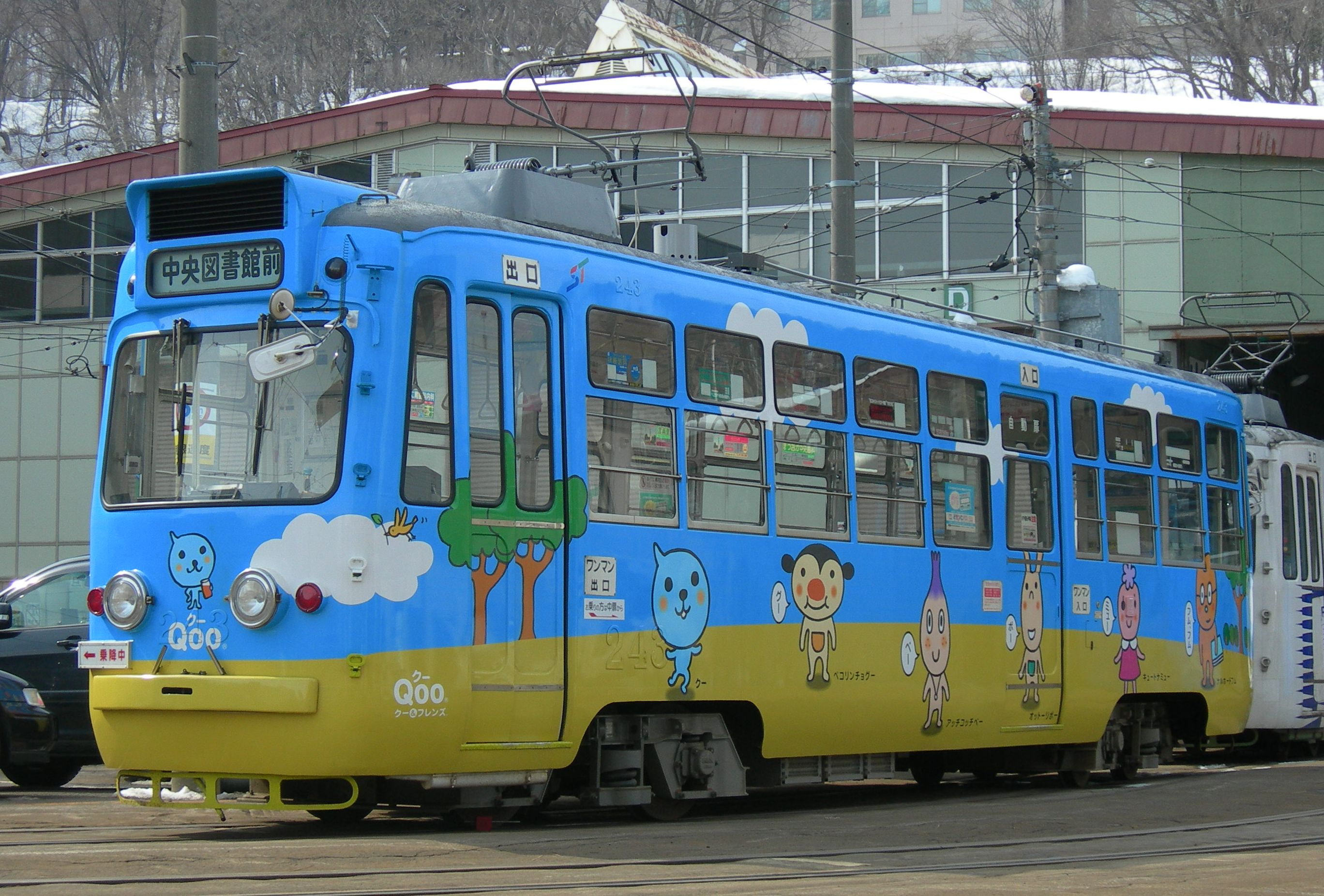 札幌市交通局240形電車